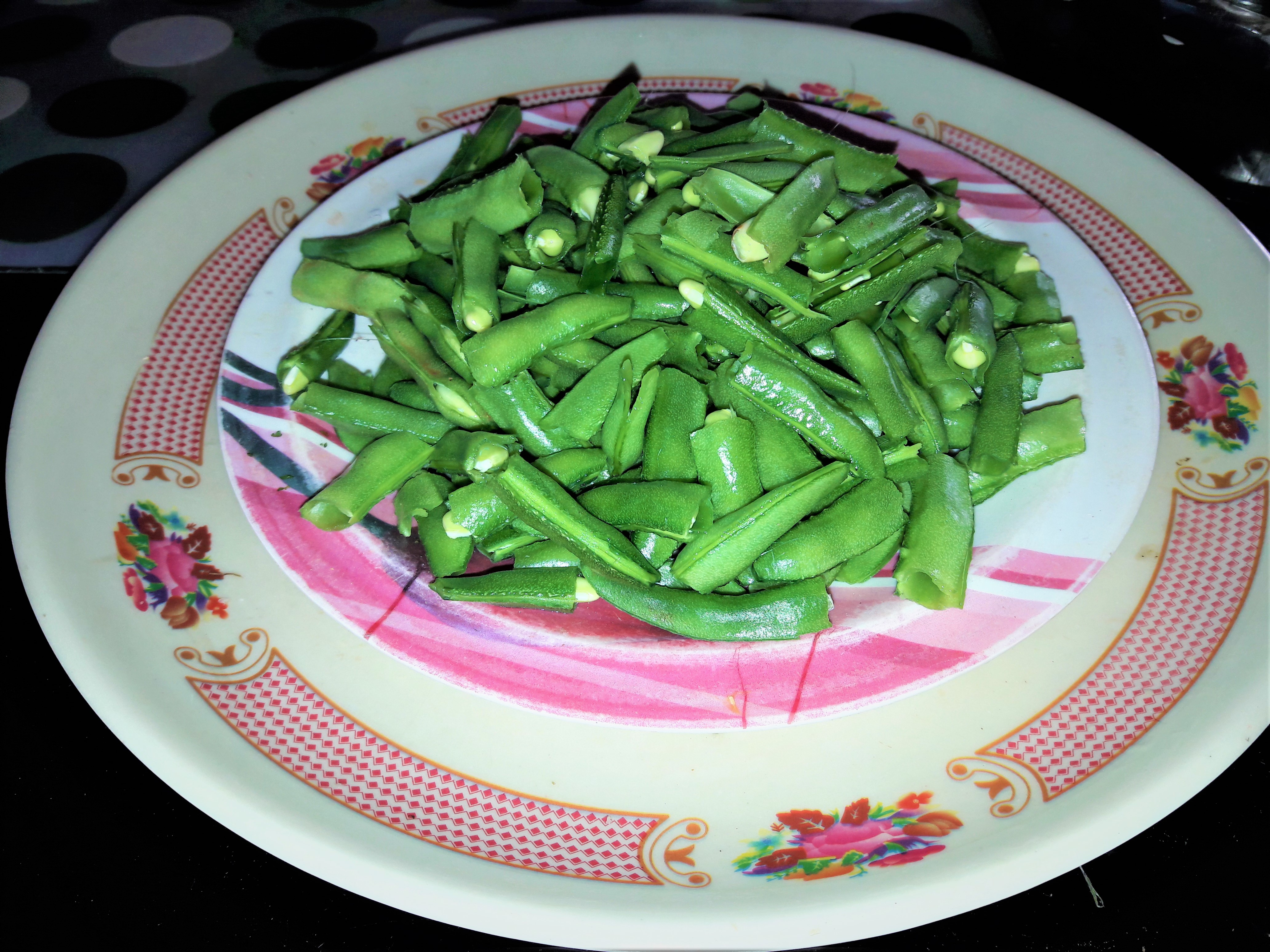 చిక్కుడుకాయ ముక్కలు